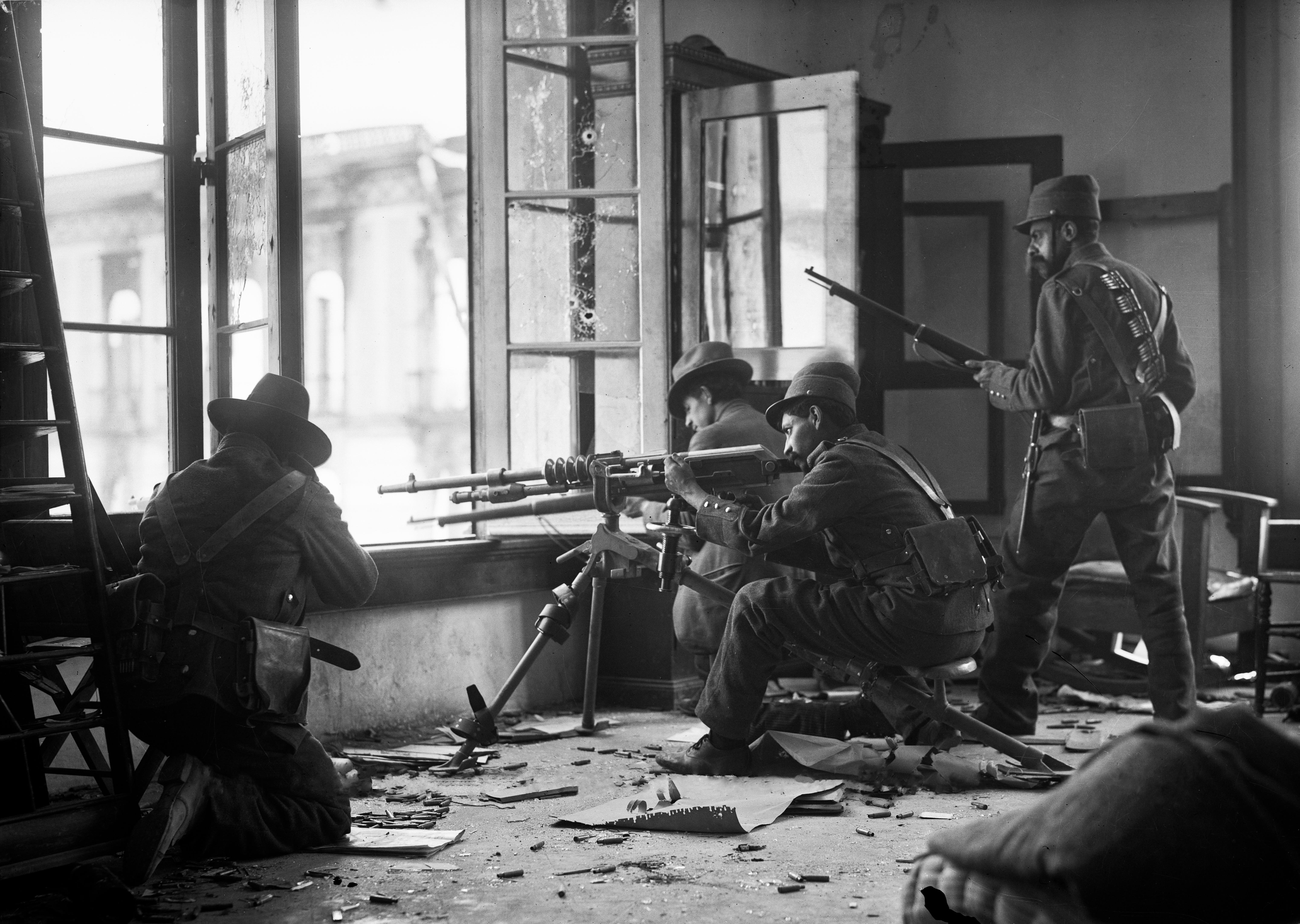 Decena trágica. Soldados sublevados en acción. 1913. Fotografia: Osuna.